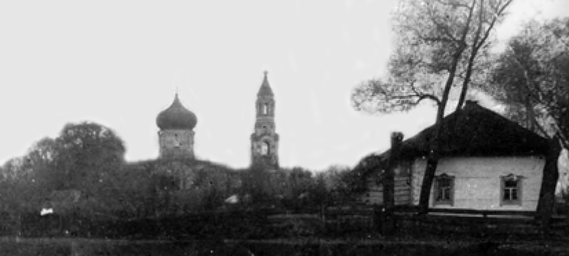 Зруйнована церква с. Ленінське